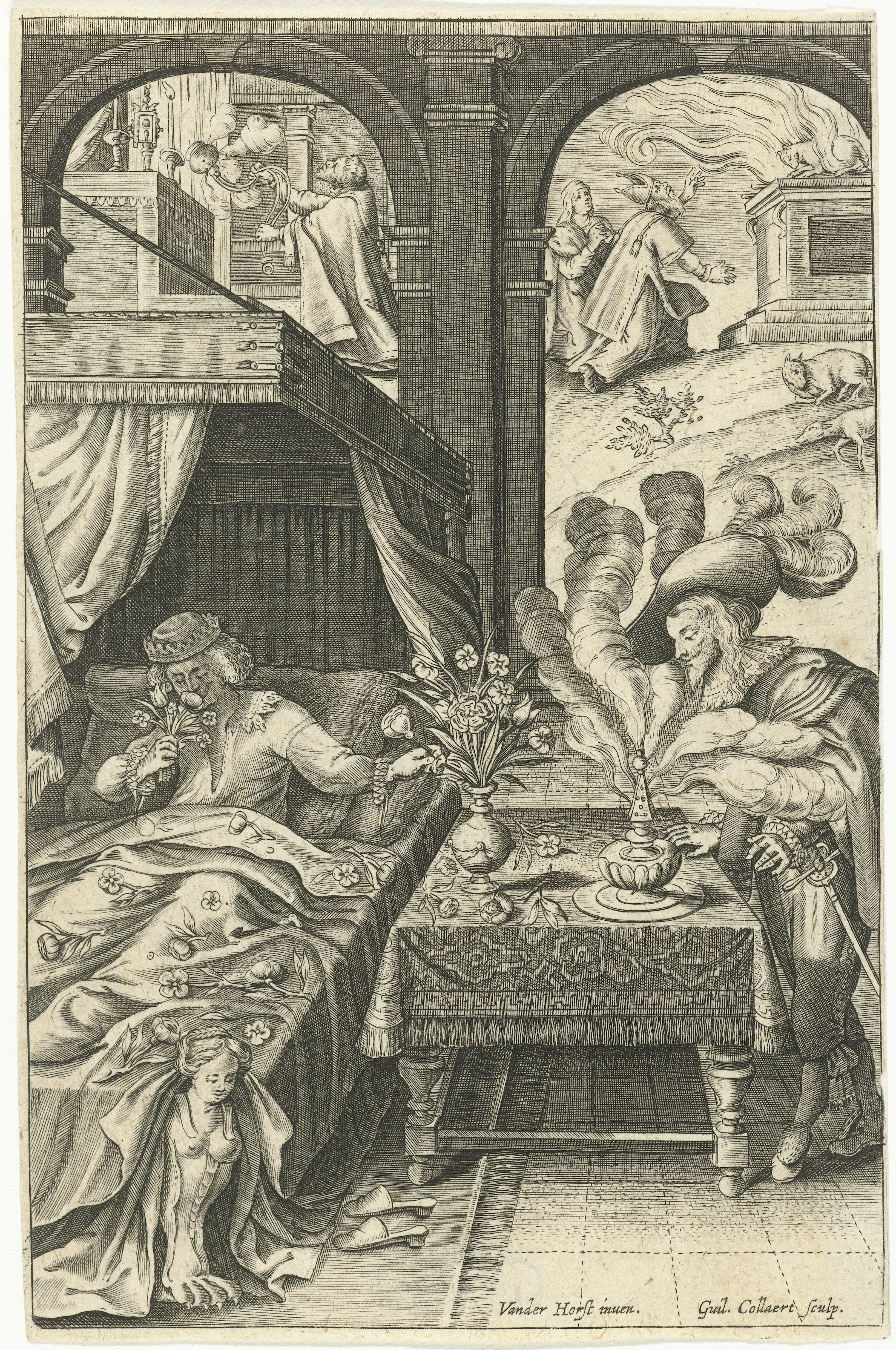 IdentificatieTitel(s): ReukObjecttype: prent boekillustratie Objectnummer: RP-P-1878-A-764Catalogusreferentie: New Hollstein Dutch 1384Opschriften / Merken: verzamelaarsmerk, verso, gestempeld: Lugt 2228Omschrijving: Een te bed liggend man ruikt aan een bloem, een ander die ter rechterzijde bij een tafel staat en Wie: ns hoed met vier grote pluimen is versierd, geniet de damp van een voor hem staande wierook vaas. In de achtergrond links een priester een wierookvat zwaaiende, rechts een brandoffer. Prent uit een serie met de vijf zintuigen vervaardigd door verschillende prentmakers.VervaardigingVervaardiger: prentmaker: Guillaume Collaert (vermeld op object)naar ontwerp van: Nicolaas van der Horst (vermeld op object)Plaats vervaardiging: AntwerpenDatering: ca. 1610 - voor 1630Fysieke kenmerken: gravureMateriaal: papier Techniek: graveren (drukprocedé)Afmetingen: blad: h 150 mm × b 98 mmToelichtingOok gebruikt als boekillustratie in: J.P. de la Serre, Le Tombeau des Delices du Monde. Brussel: F. Vivien, 1630.OnderwerpWat: smell, smelling (one of the five senses)Verwerving en rechtenVerwerving: aankoop 7-jan-1878Copyright: Publiek domein